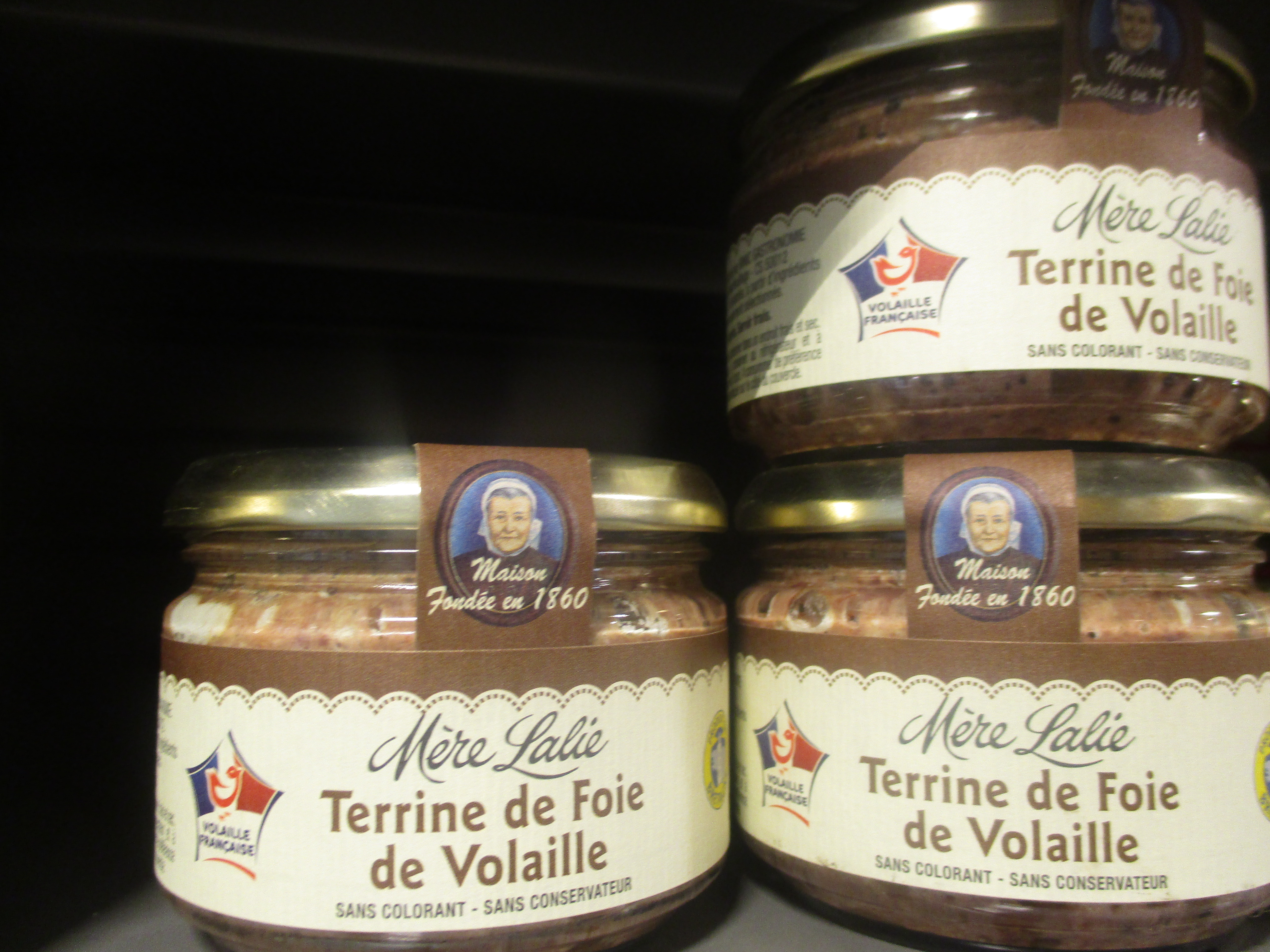 Terrine de foie de volaille de chez Mère Lalie, marque de la société Binic Gastronomie, fondée à Binic dans les Côtes d'Armor.